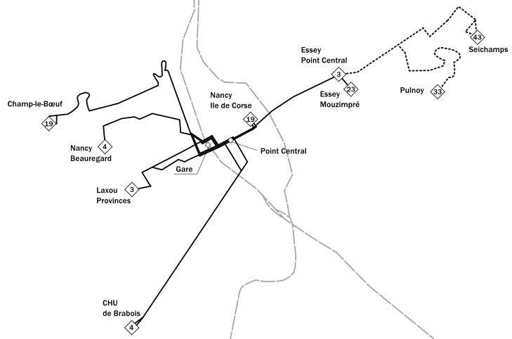 Réseau de trolleybus de Nancy en 1983. Les traits pointillés correspondent aux sections de ligne non électrifiés et exploités en mode thermique. D'après Jean-Claude Roffet, Nancy, une politique pour les déplacements urbains, CETUR, 1987.